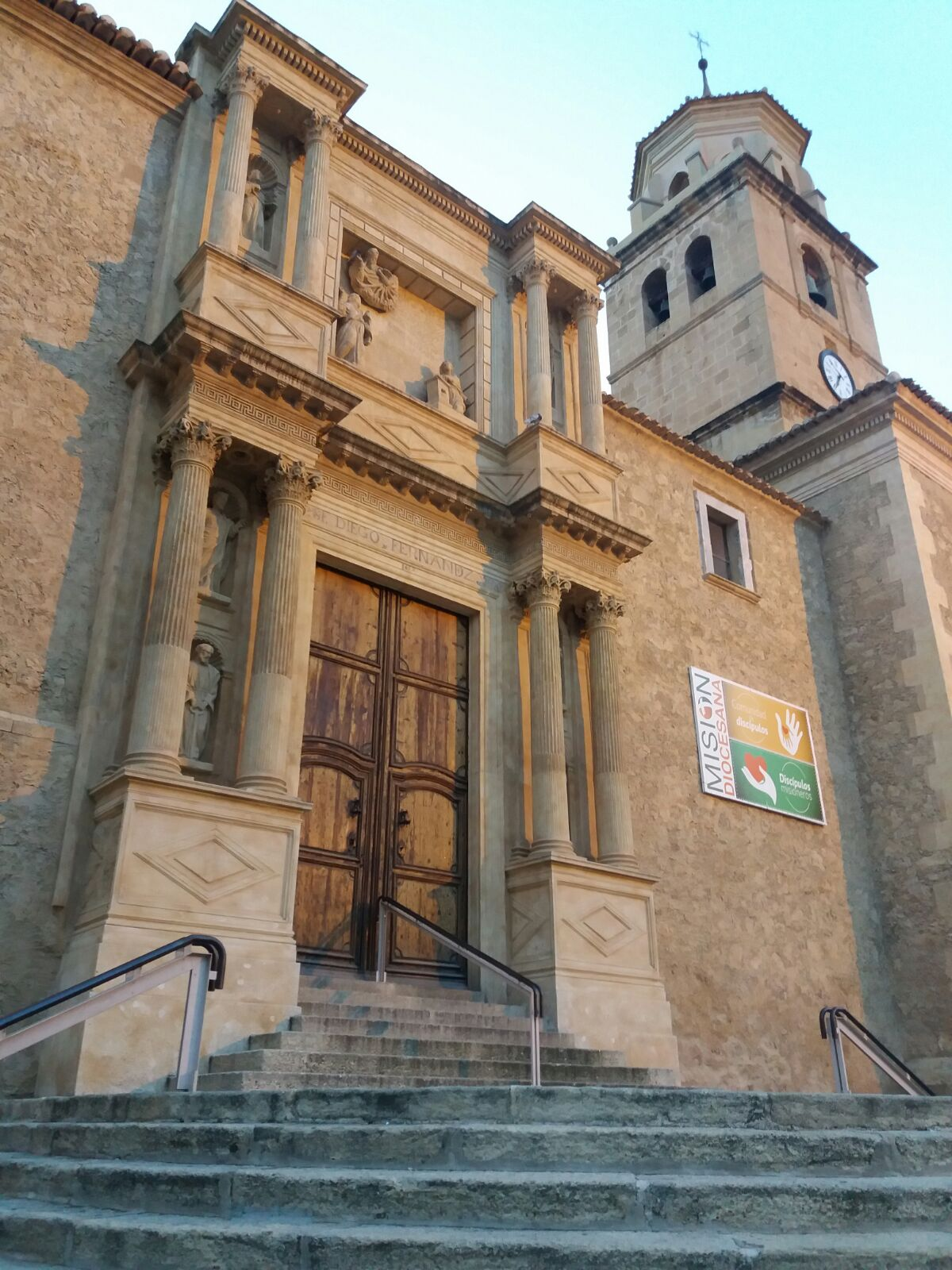 puerta principal junto con la torre caracteriastica